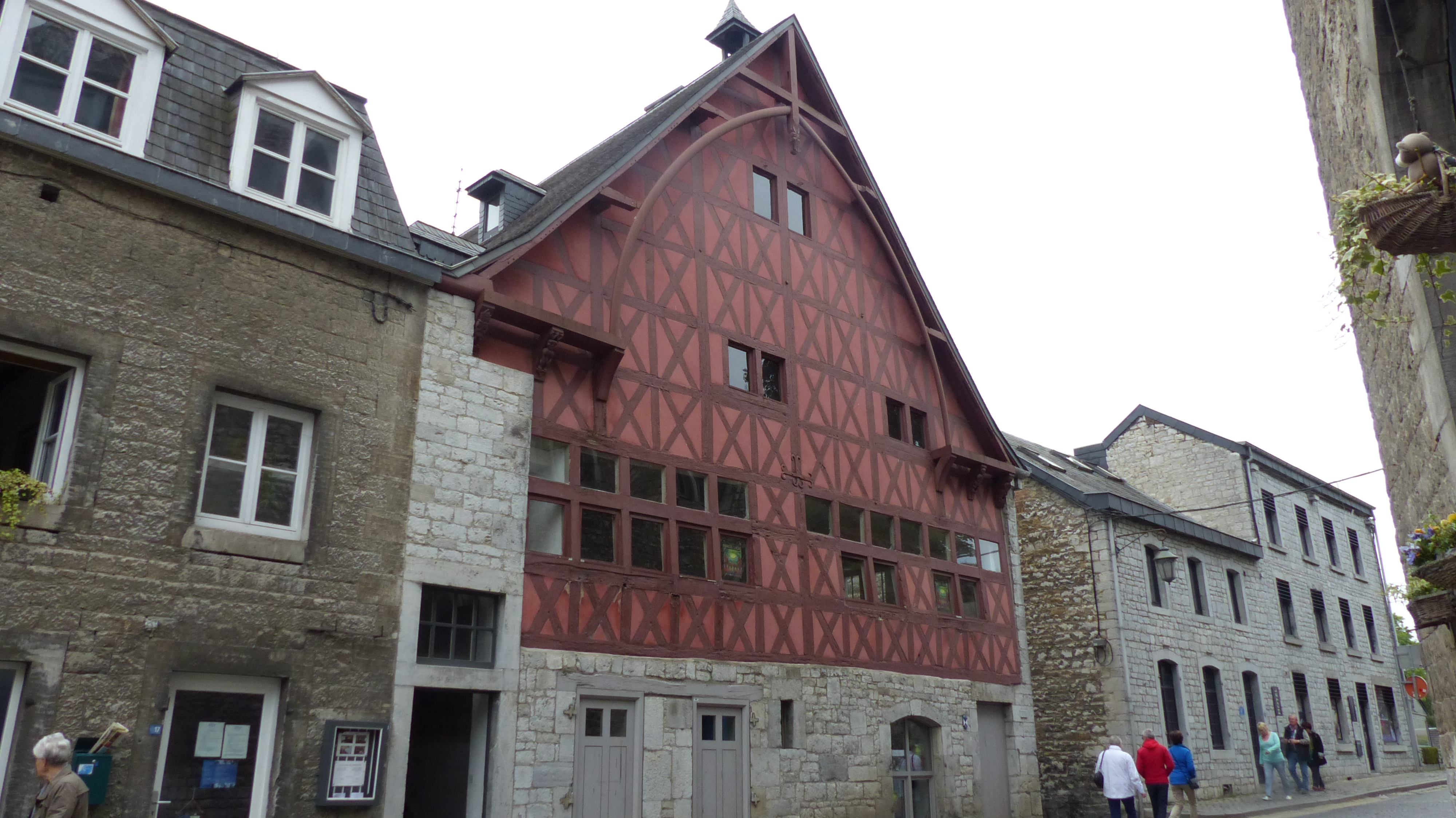 La halle aux blés ou maison espagnole, à Durbuy